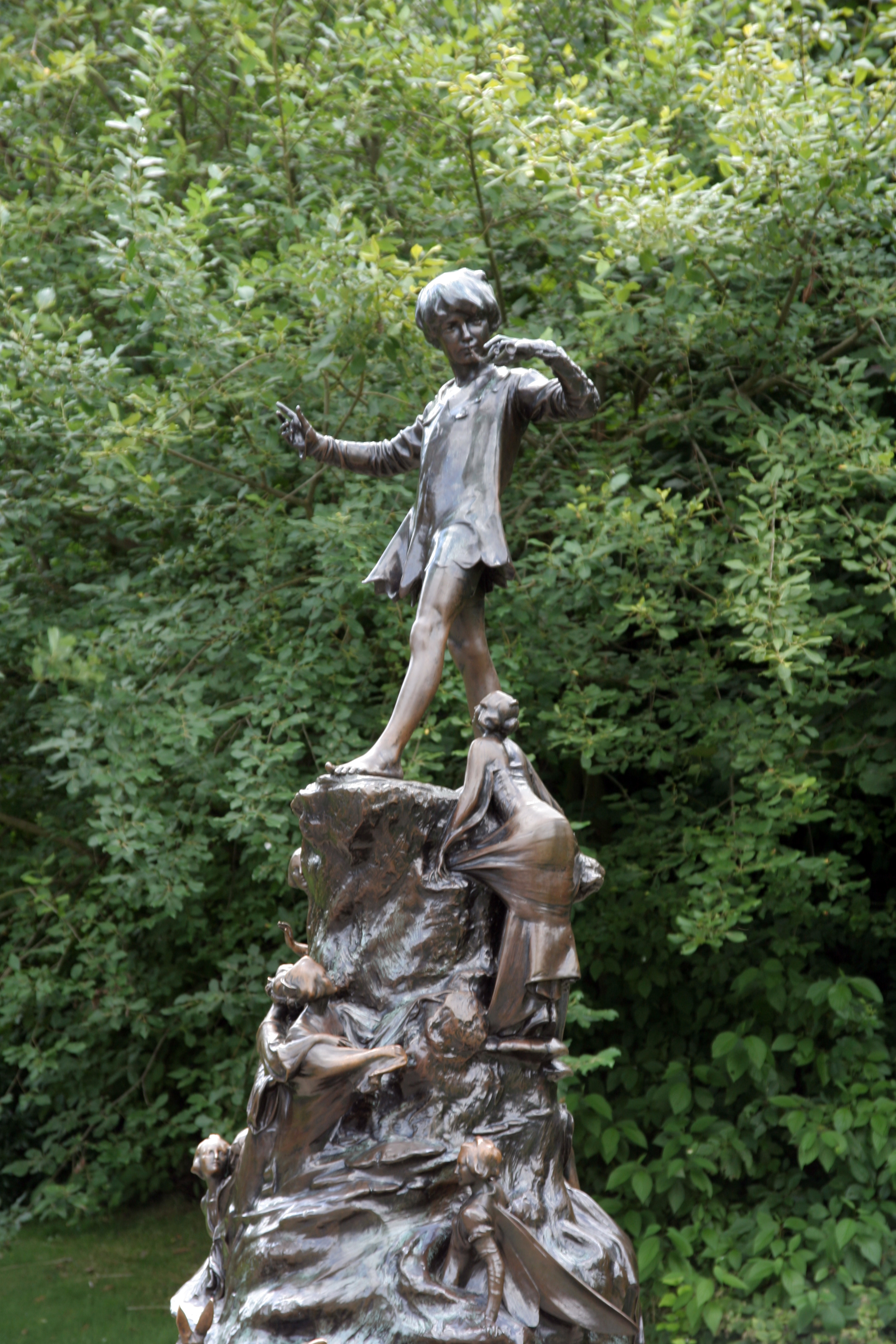 Peter Pan